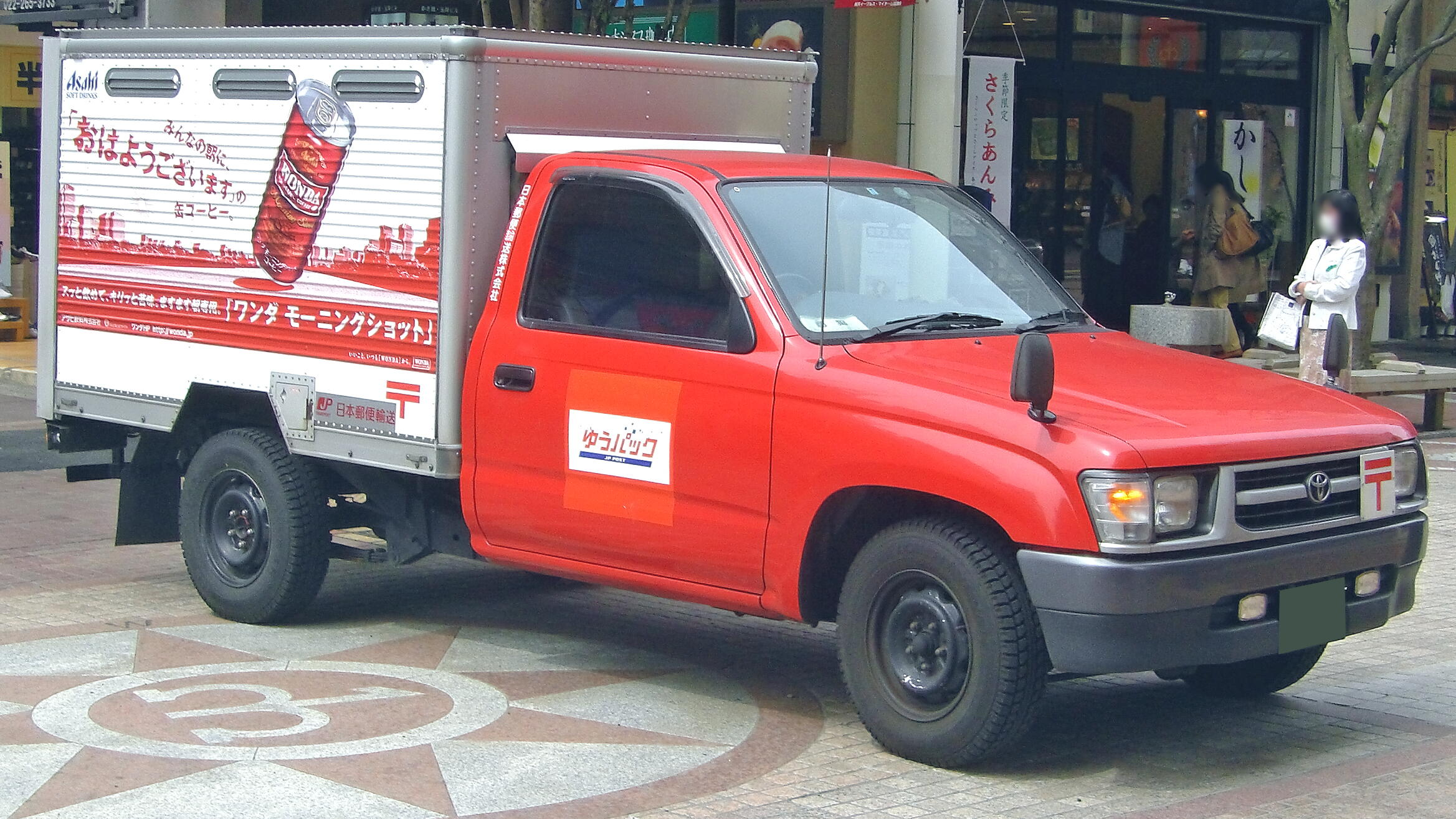 トヨタ・ハイラックス（6代目）の郵便収集車